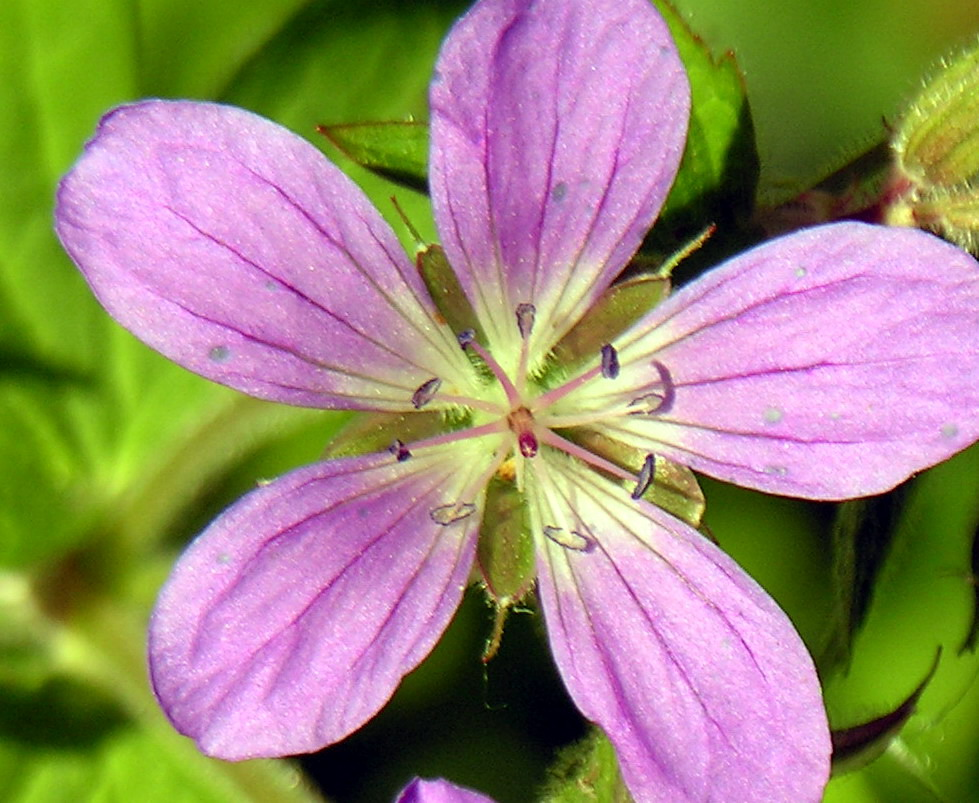 Miškinio snapučio (Geranium sylvaticum) žiedas Šeima. Snaputiniai (Geraniaceae) Foto: Algirdas, 2006 m. birželio 3 d., Lietuva